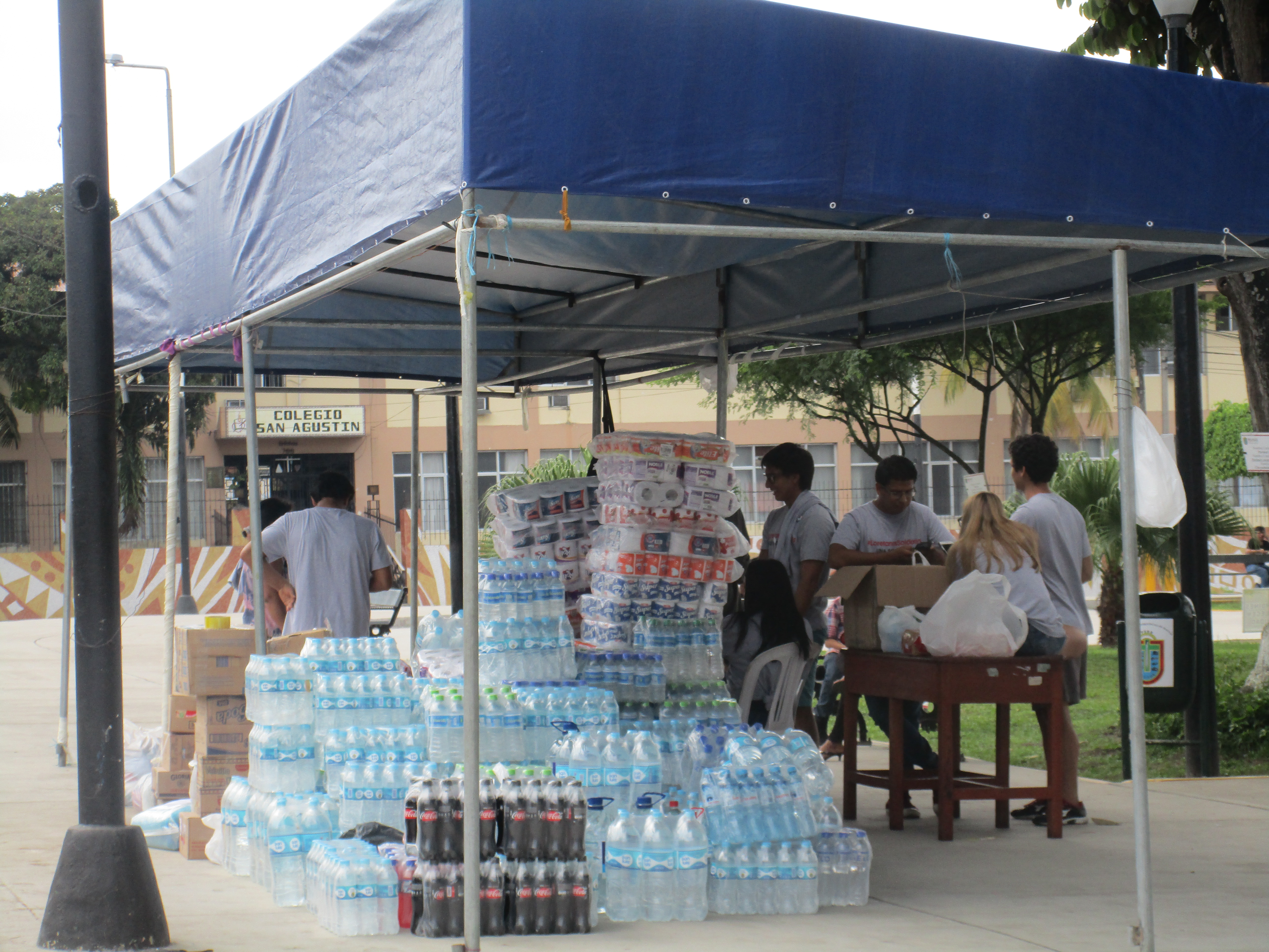 Sitio de donación en Iquitos para los damnificados por las lluvias y huaicos.